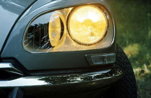 Draaiende verstraler van een DS